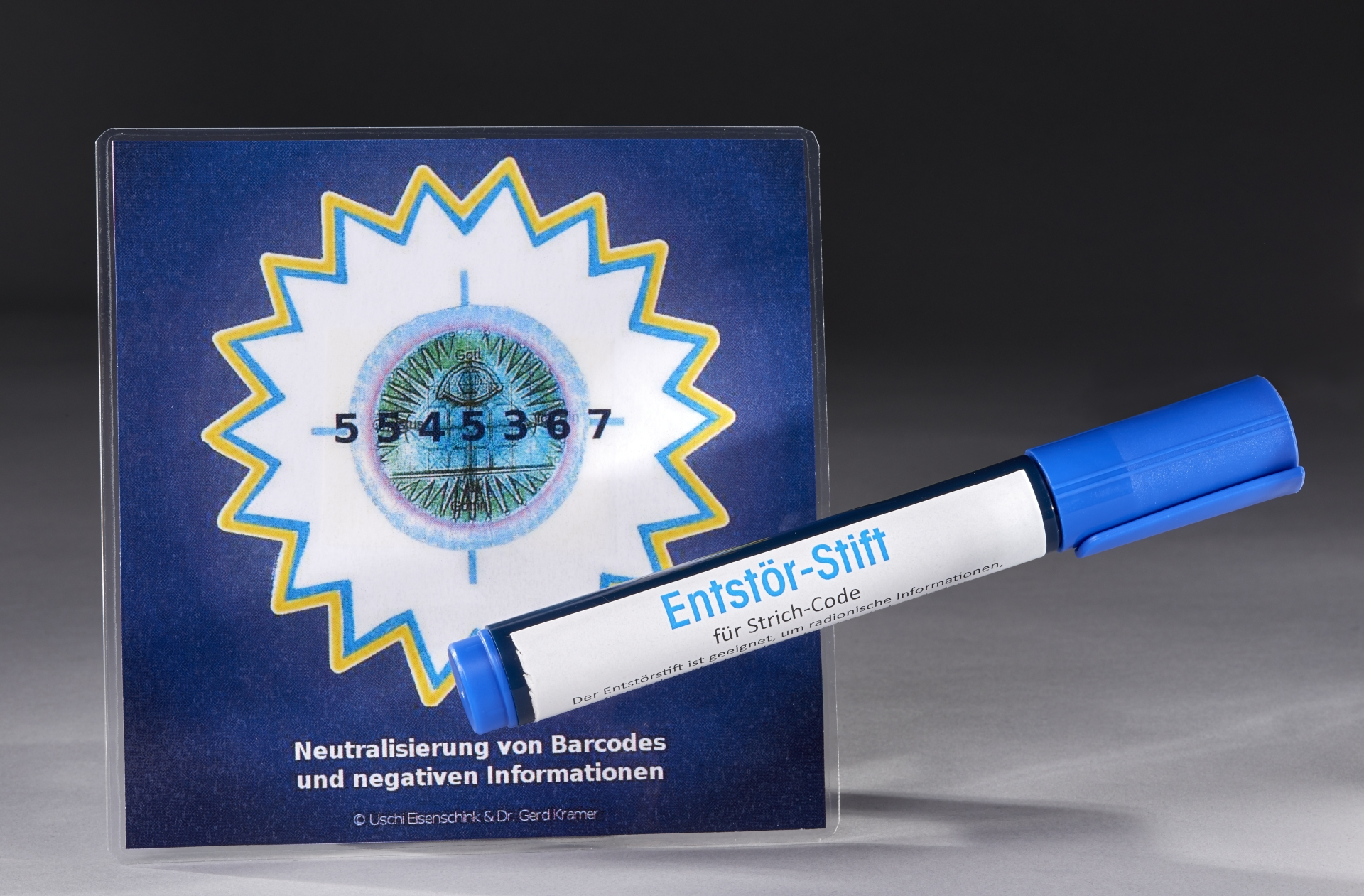 Exponat in der Sonderausstellung "Verschwörungstheorien - früher und heute" der Stiftung Kloster Dalheim. LWL-Landesmusem für Klosterkultur: Der Barcode-Verschwörung zufolge geben Scancodes auf Produkten negative Energien ab, mit deren Hilfe eine „geheime Regierung“ sukzessive die Weltbevölkerung reduzieren will. Hilfsmittel wie dieser Entstör-Stift sollen die gekauften Produkte neutralisieren und den Code unschädlich machen. Foto: LWL/Ansgar Hoffmann